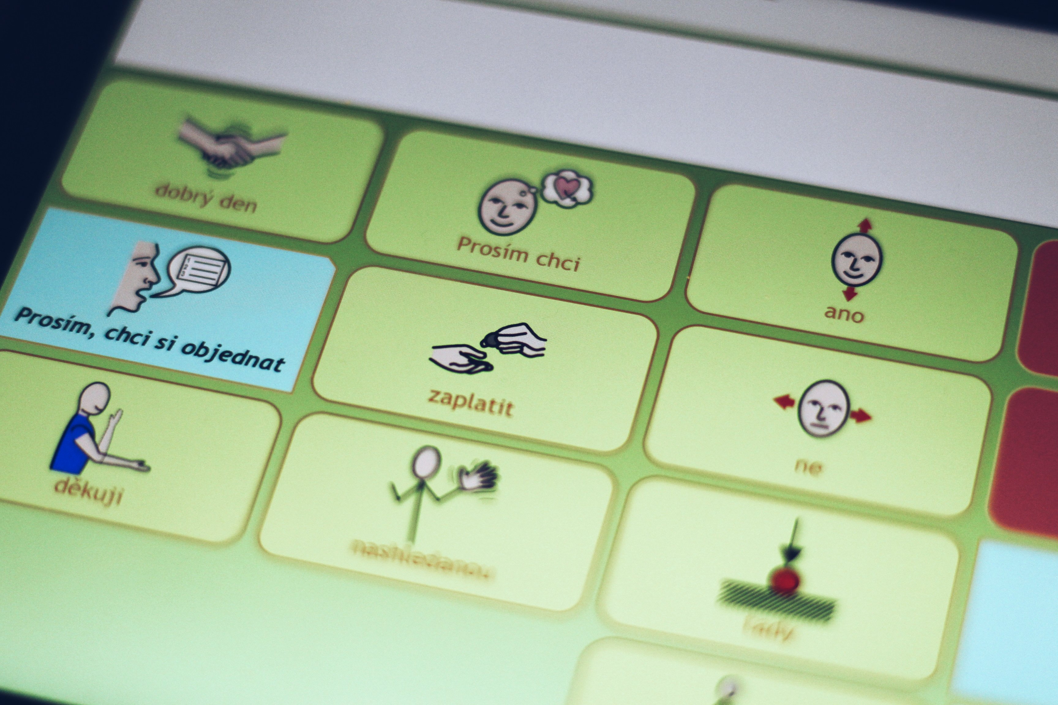 Alternativní komunikace pomocí tabletu